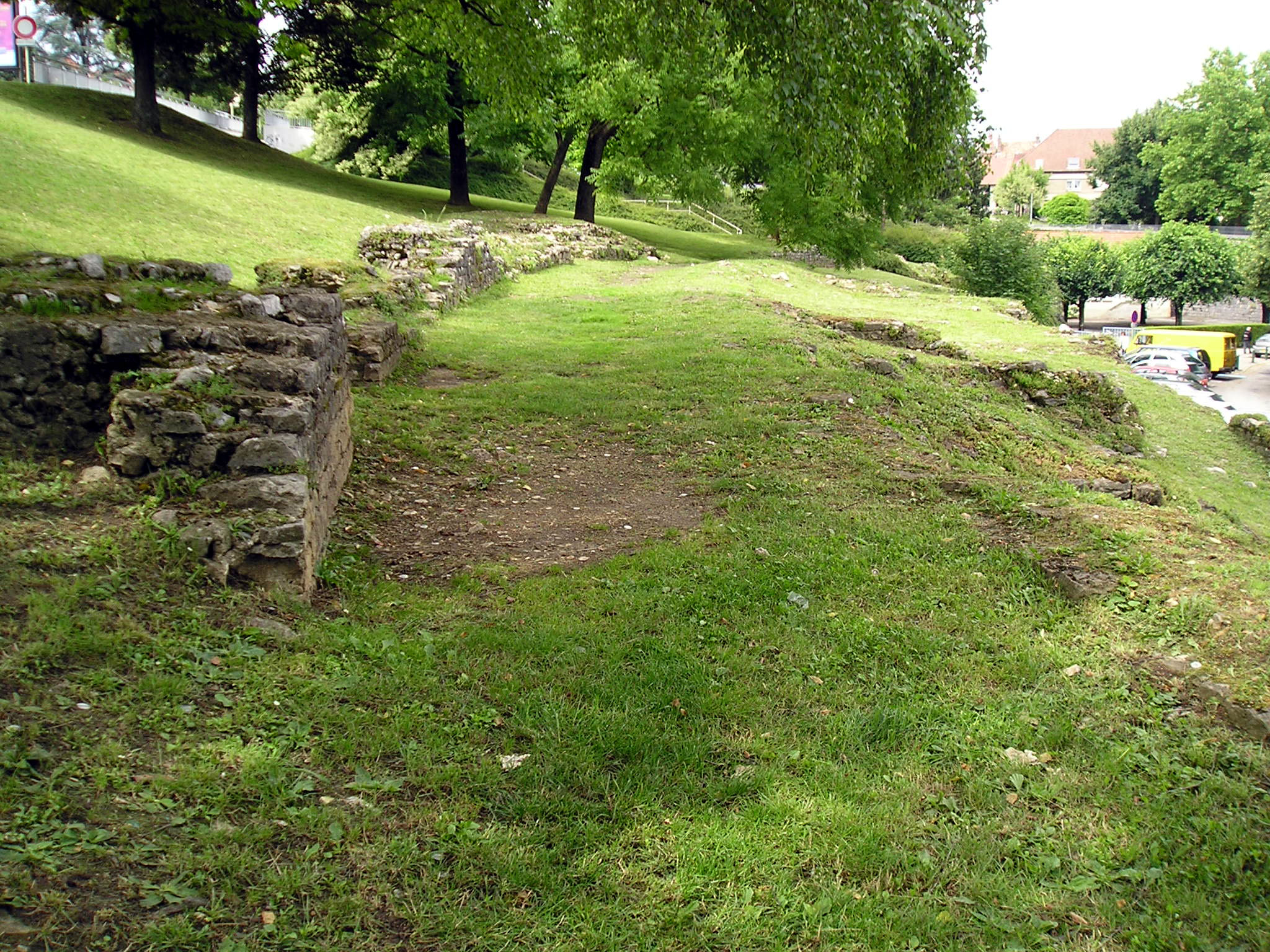 Vestiges des arènes gallo-romaines de Besançon